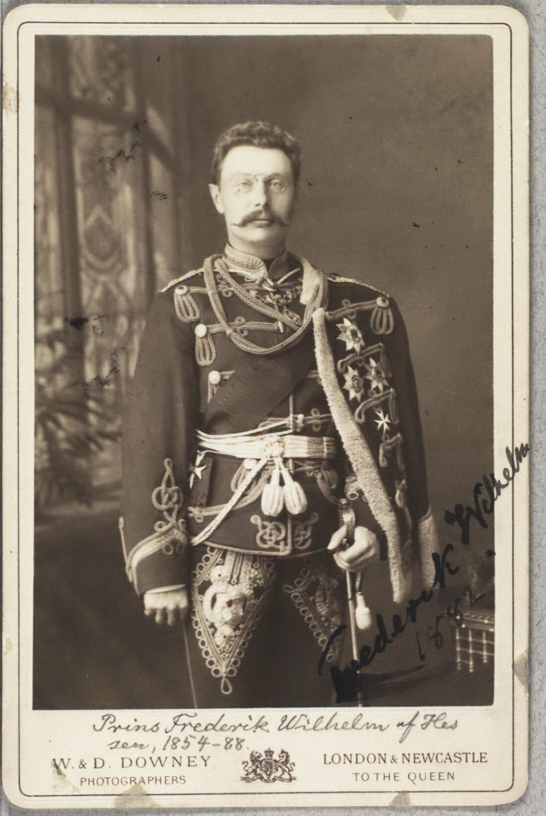 Porträt Friedrich Wilhelm Landgraf von Hessen-Kassel (1854–1888), in der Uniform eines Husarenoffiziers, ab 1884 Chef des Hauses Hessen-Kassel.